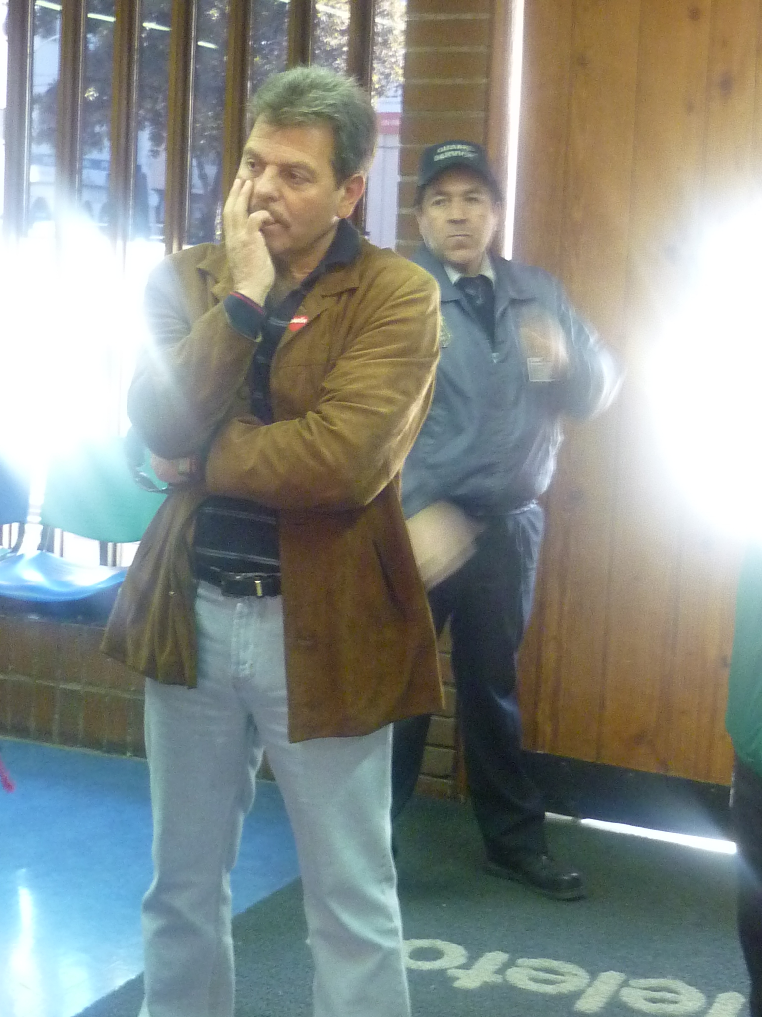 Fotografía de Jorge "Peineta" Garcés, director técnico, durante una visita a la sede de la Teletón en Valparaíso junto a Santiago Wanderers de Valparaíso.